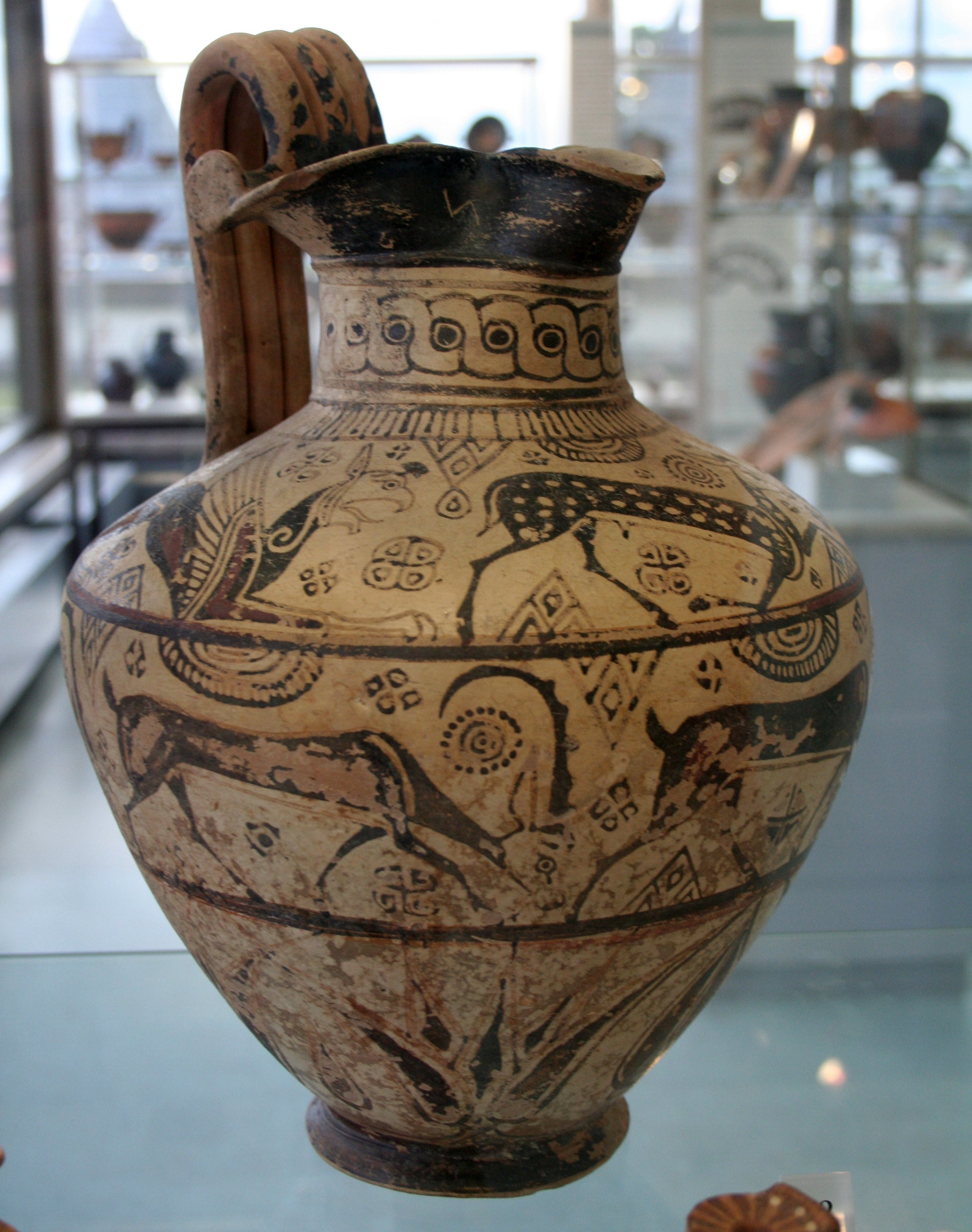 Antikenmuseum der Universität Heidelberg